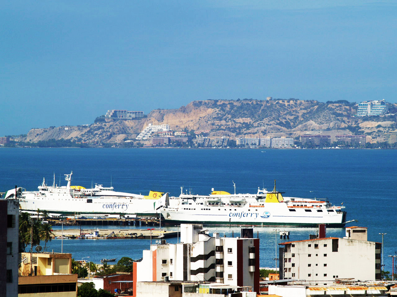 ferry